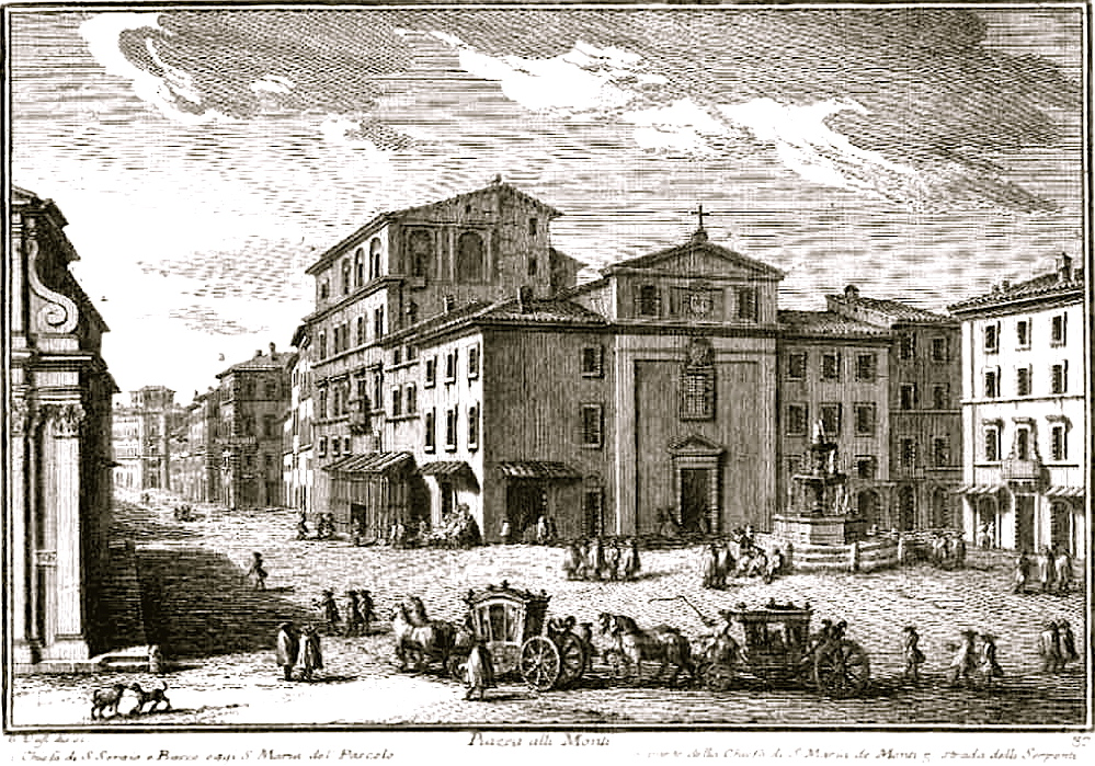 Engraving of Piazza dei Monti